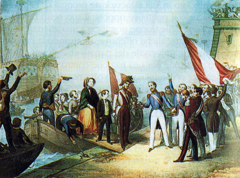 Il granduca Leopoldo II sbarca a Viareggio il 24 luglio 1849.